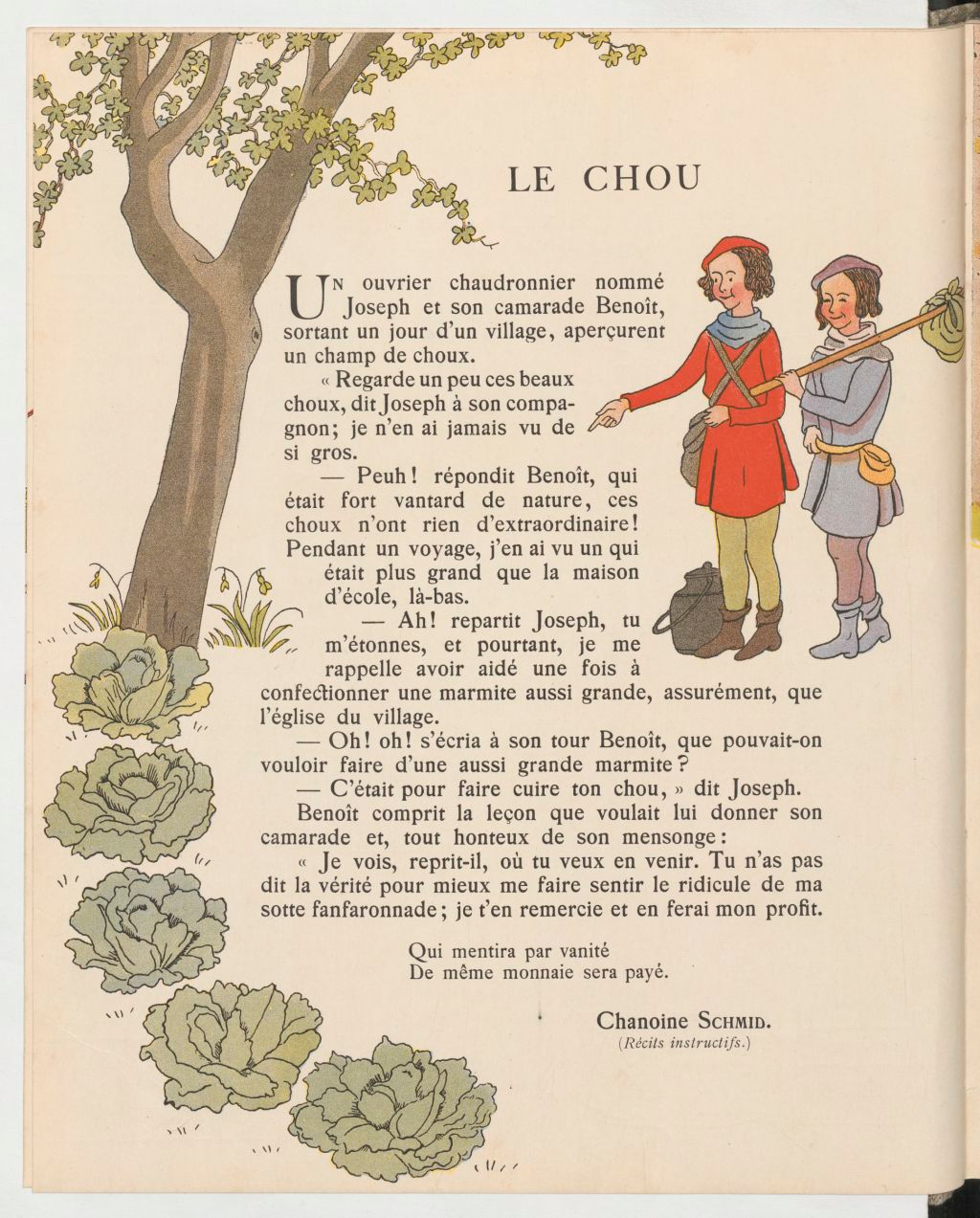 Contes et images, illustrations Marie-Madeleine Franc-Nohain : Le chou par Christoph von Schmid.